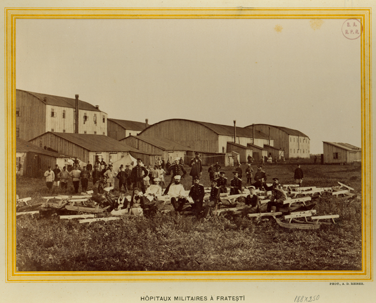 From the album "La construction des chemins de fer militaires de l'armée russe - Bucharest-Zimnicea" Hôpitaux militaires à Frateşti